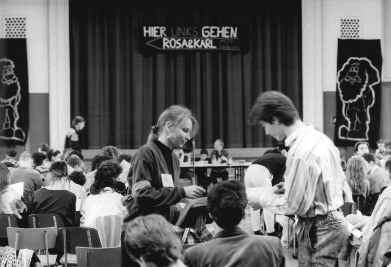 Berlin, Gründungskongress, "Junge Linke" ADN-ZB Franke 3.2.90 Berlin: Ihren Gründungskongreß hielt die marxistische Jugendvereinigung "Junge Linke" in der Carl-von-Ossietzky-Oberschule in Berlin-Pankow ab. F.[...*] S.[...*] von der Heinrich-Hertz-Oberschule und J.[...*]-L.[...*] S.[...*] von der Heinrich-Schliemann-Schule verteilen Diskussionspapiere. -siehe auch 1990-0203-12N